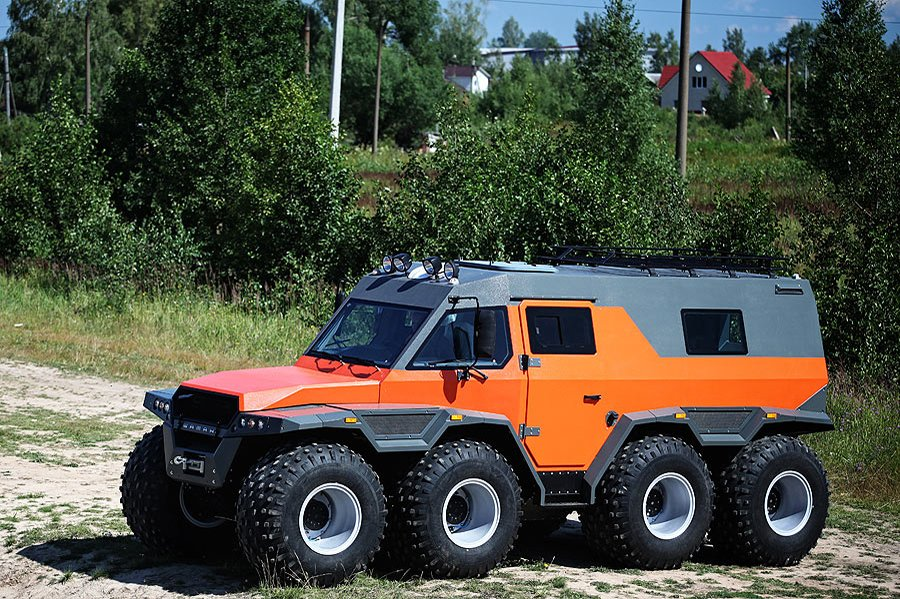 Шаман — вездеход-амфибия на шинах сверхнизкого давления, производится компанией "Авторос".